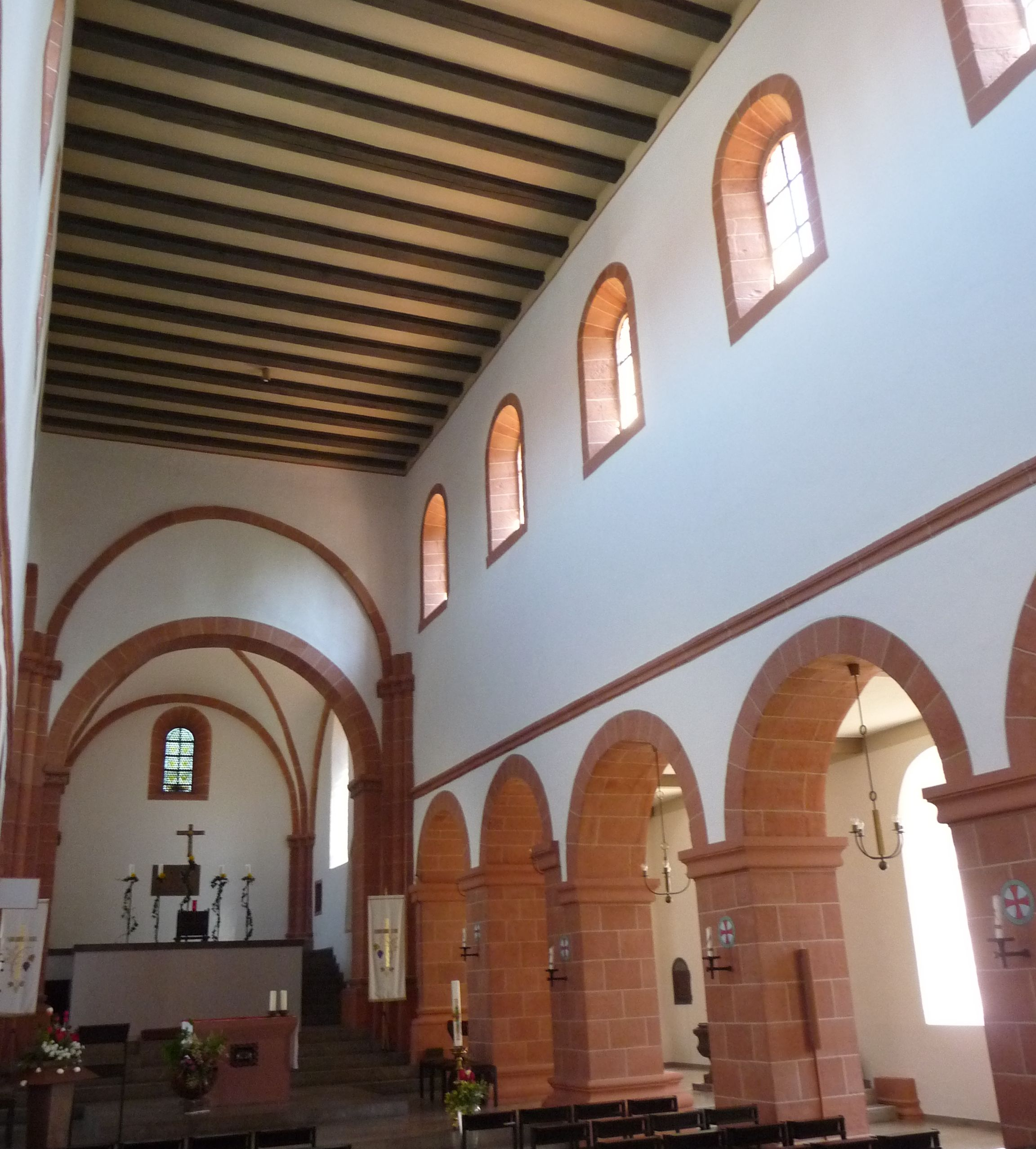 Basilika St. Lambert in Bechtheim